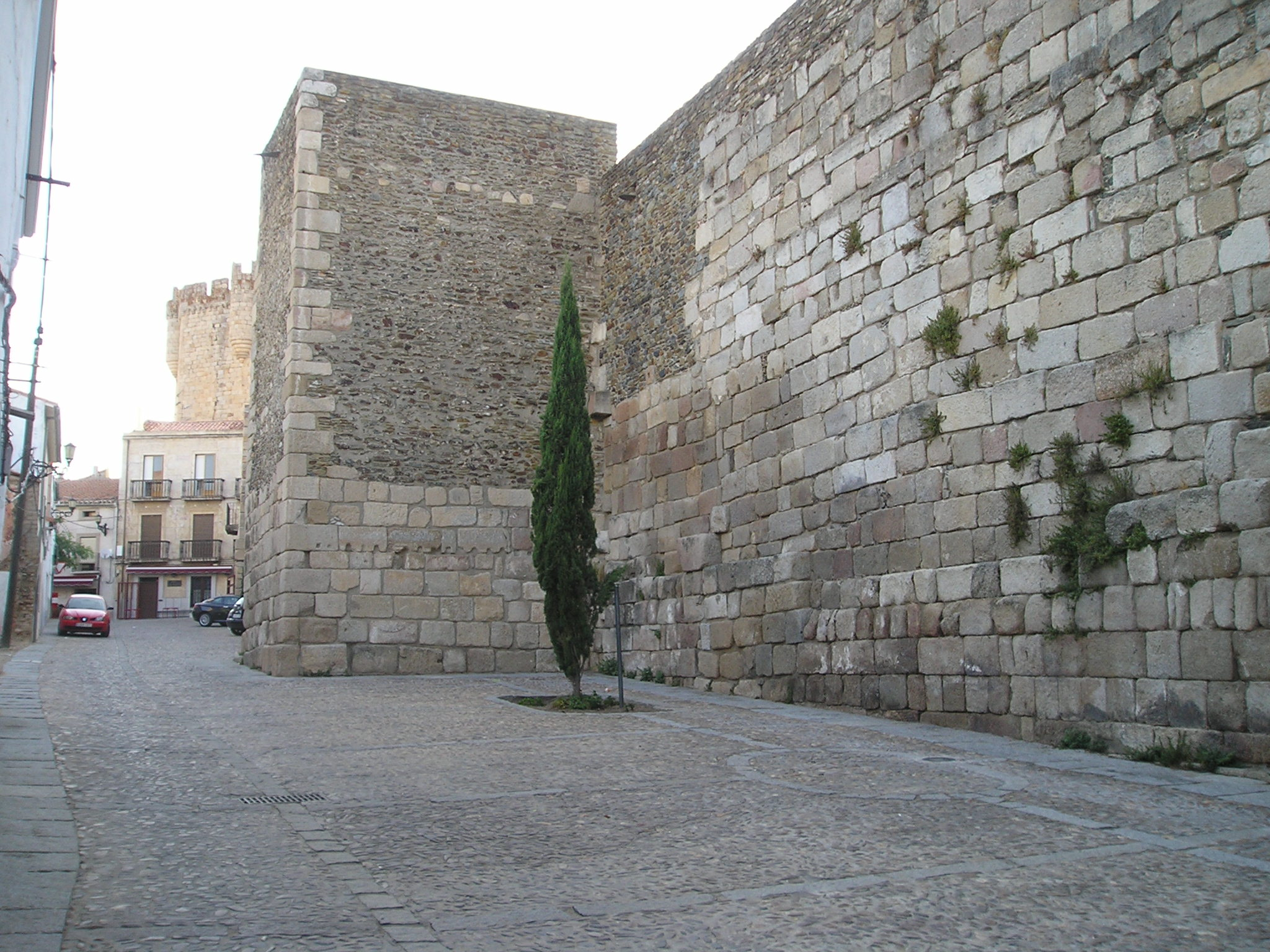 Muralla de la ciudad de Coria, de origen romano, con reconstrucción medieval.